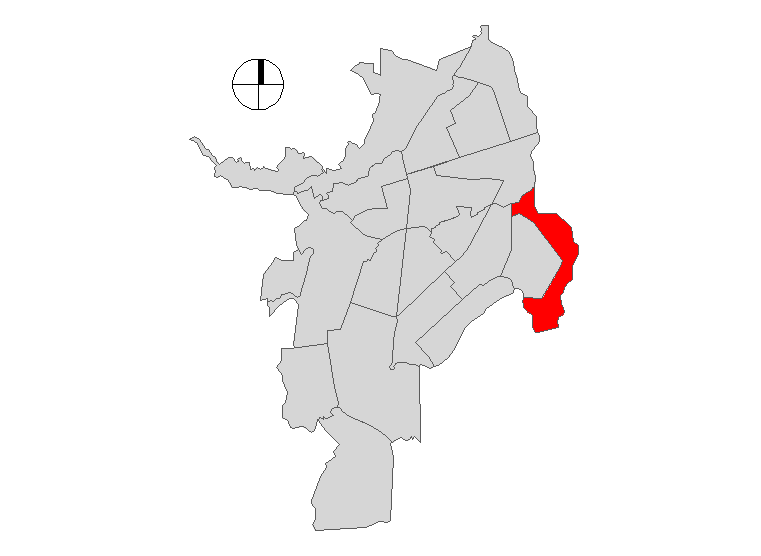 Comuna de Santiago de Cali, Colombia.